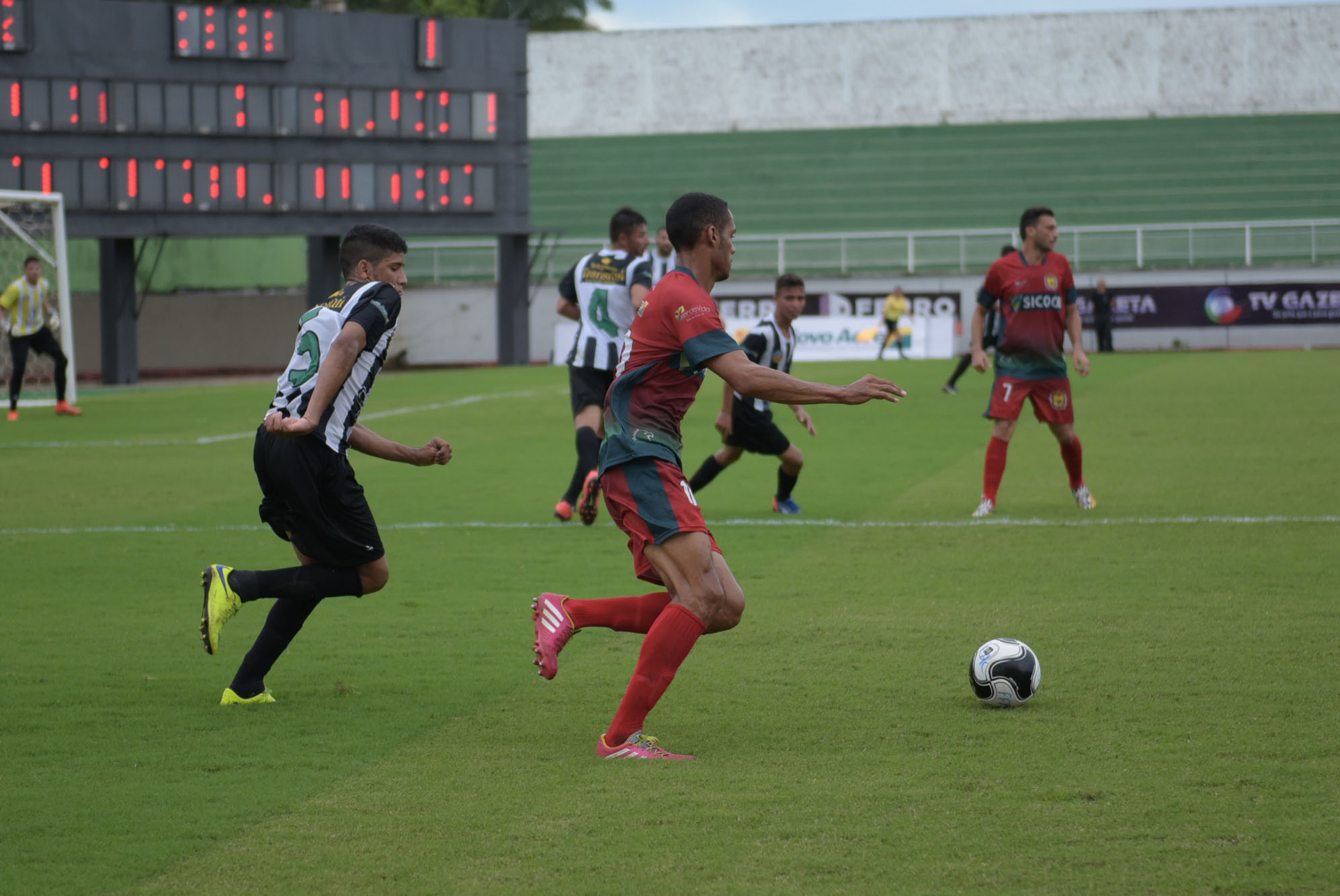 Fotos: Diego Gurgel/Secom